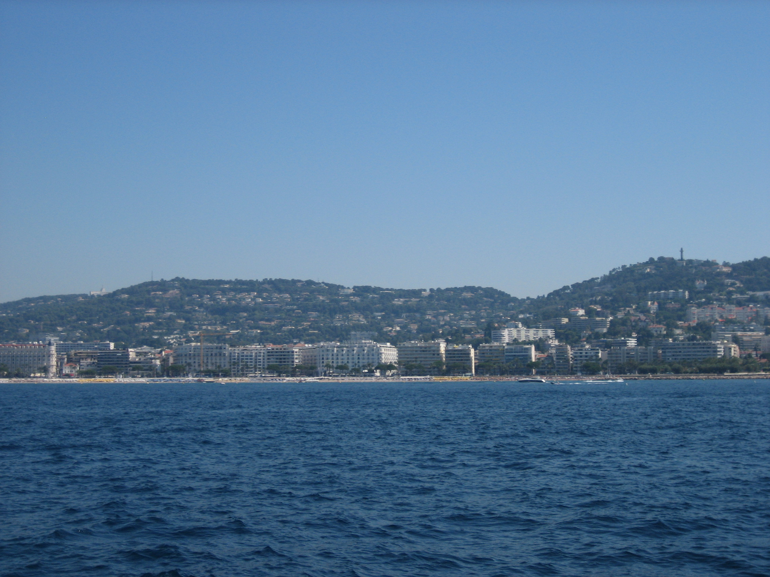 Collines des Gabres et de la Californie, boulevard de la Croisette et à l'extrême gauche l'hôtel Carlton, depuis la baie de Cannes.